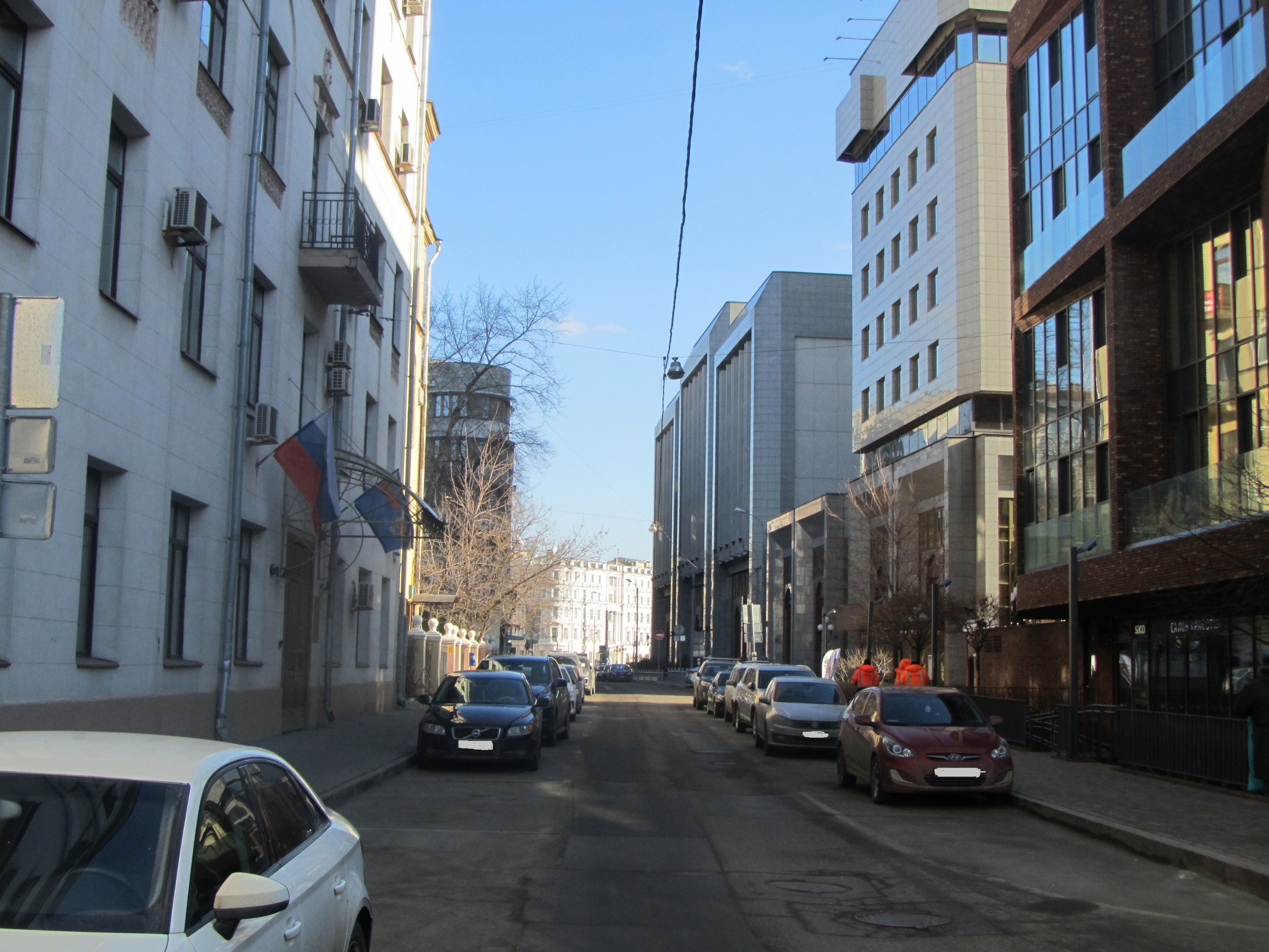 Вид улицы Бурденко (Москва) в сторону Садового кольца